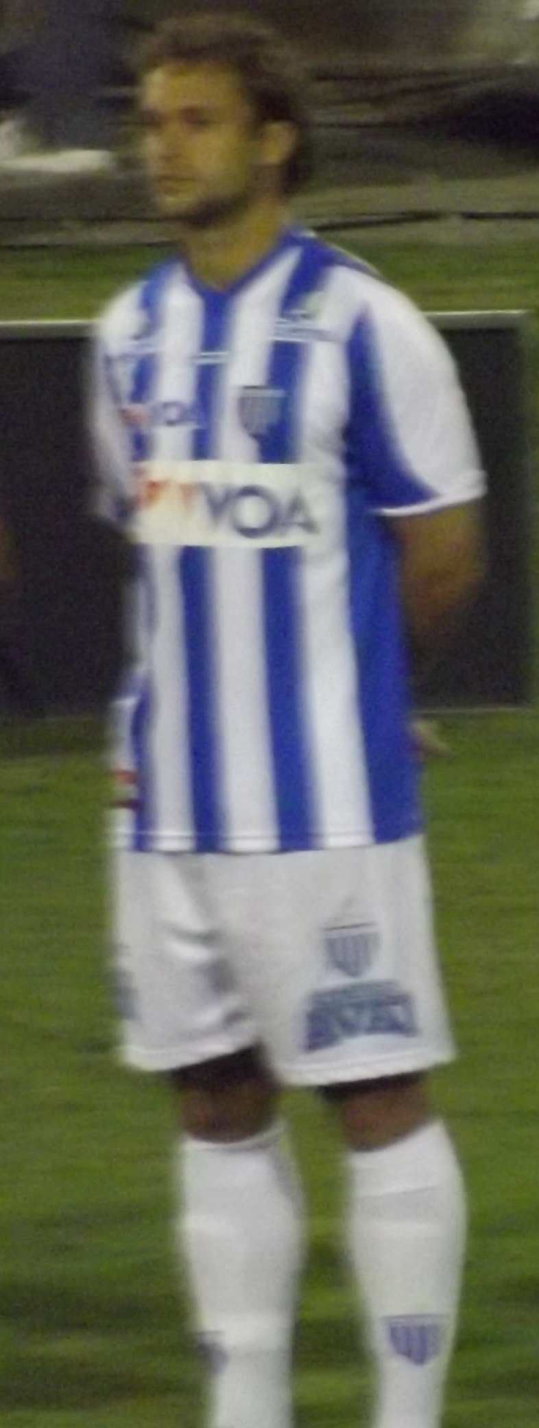 Cassio atuando pelo Avaí.